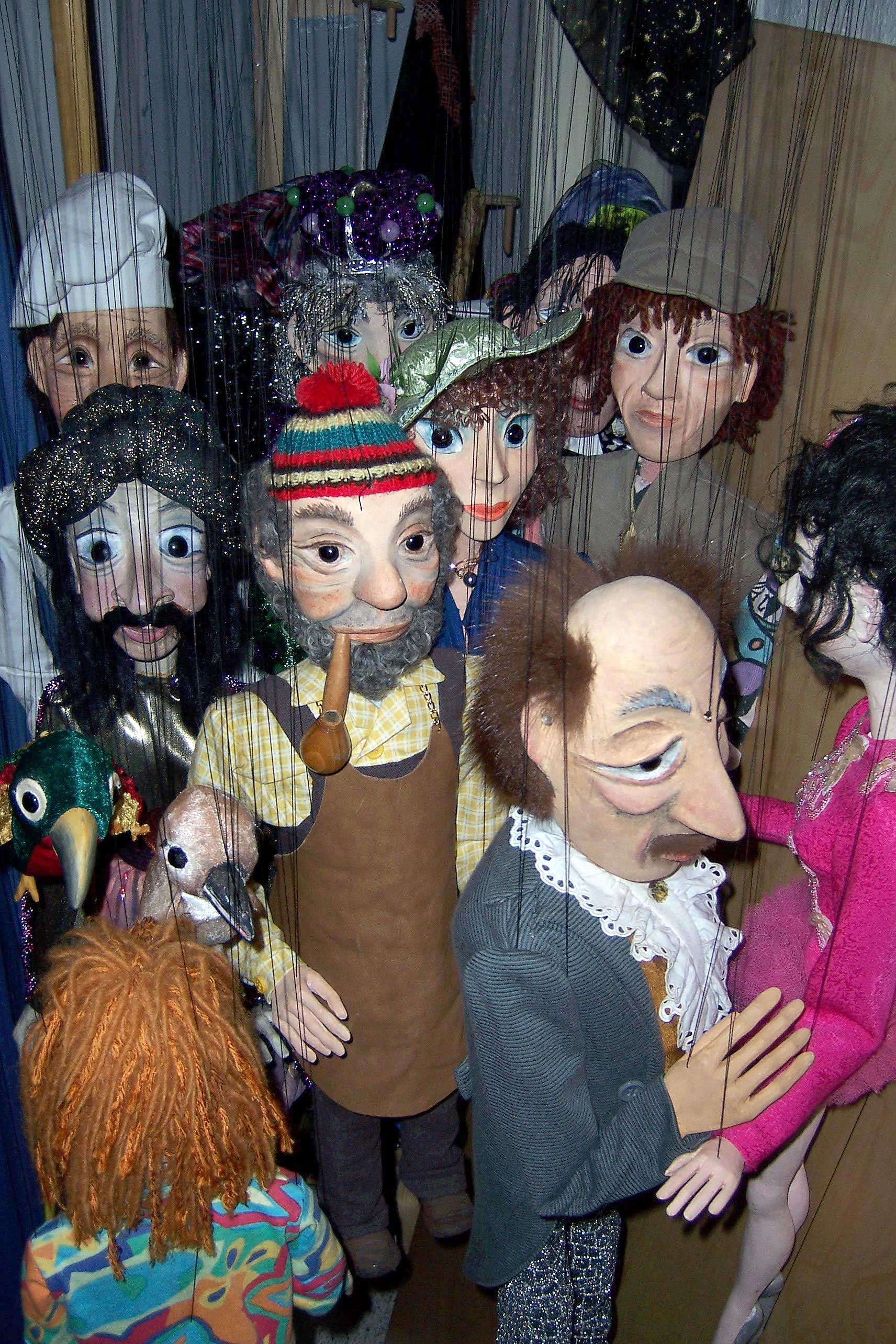 Marionetten Theater Plön, Schleswig-Holstein